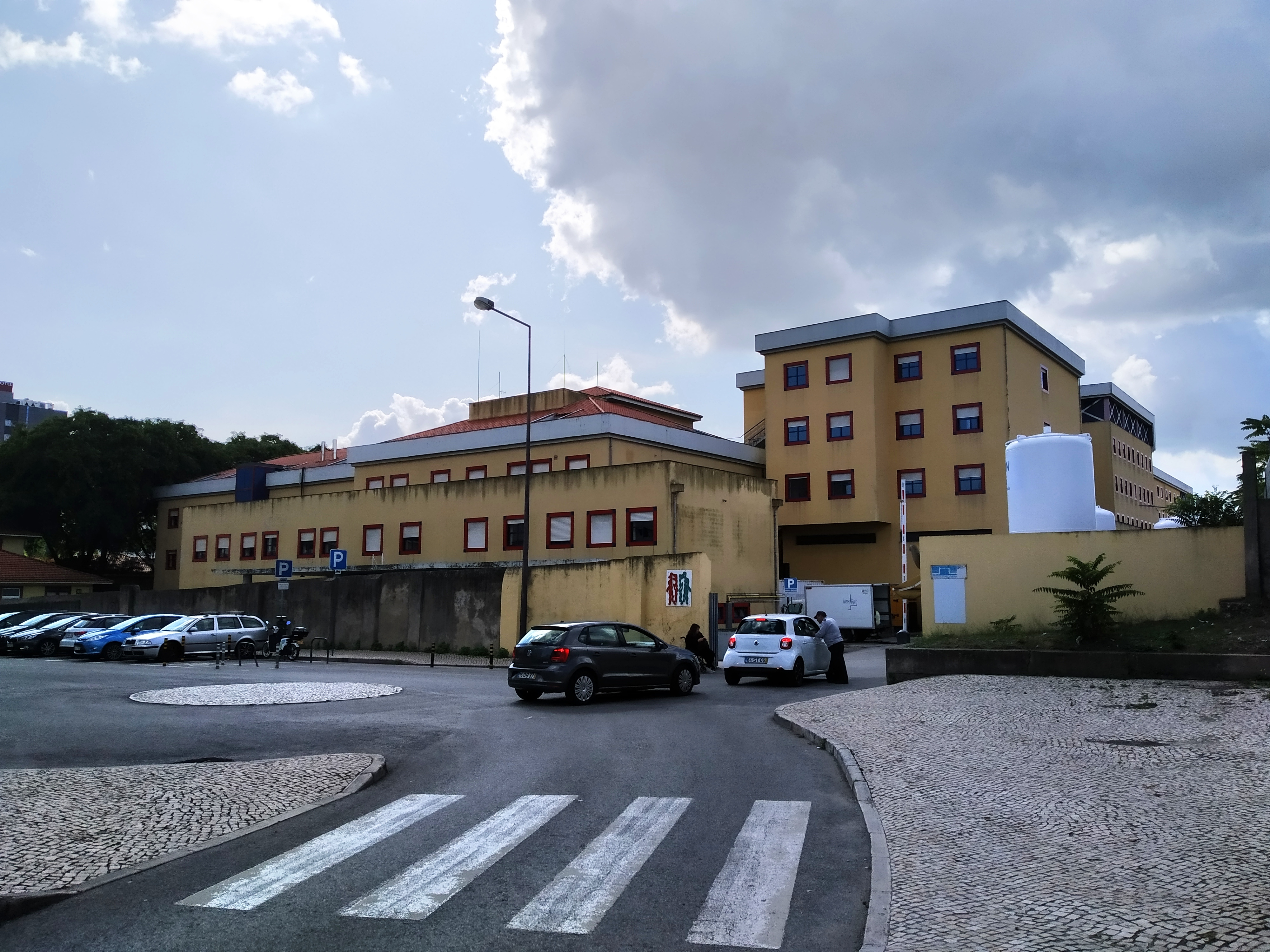 Entrada do Hospital Curry Cabral, na Rua Ivone Silva, Lisboa